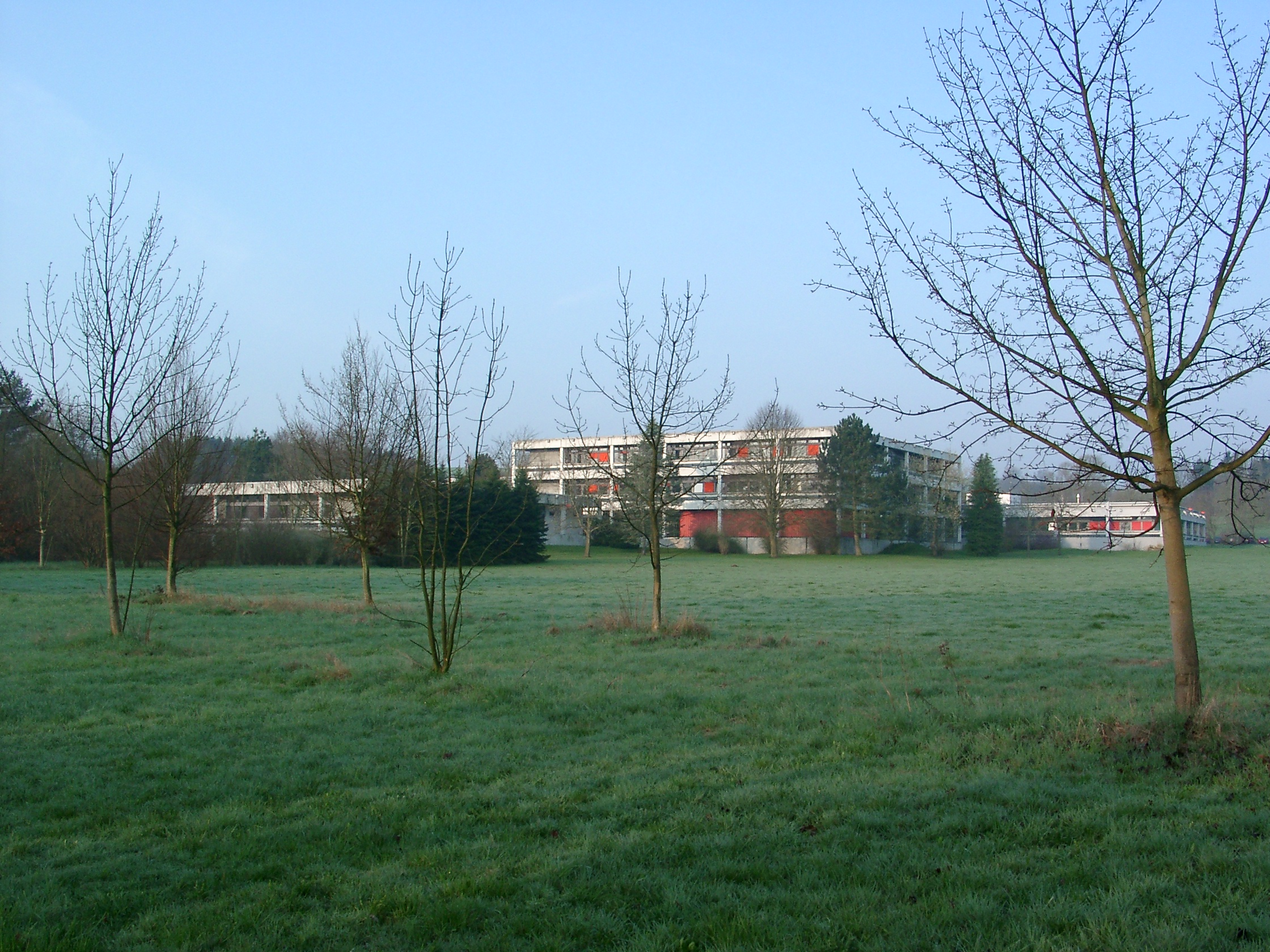 Max Planck Institute for Solarsystem Research in Katlenburg-Lindau 2006